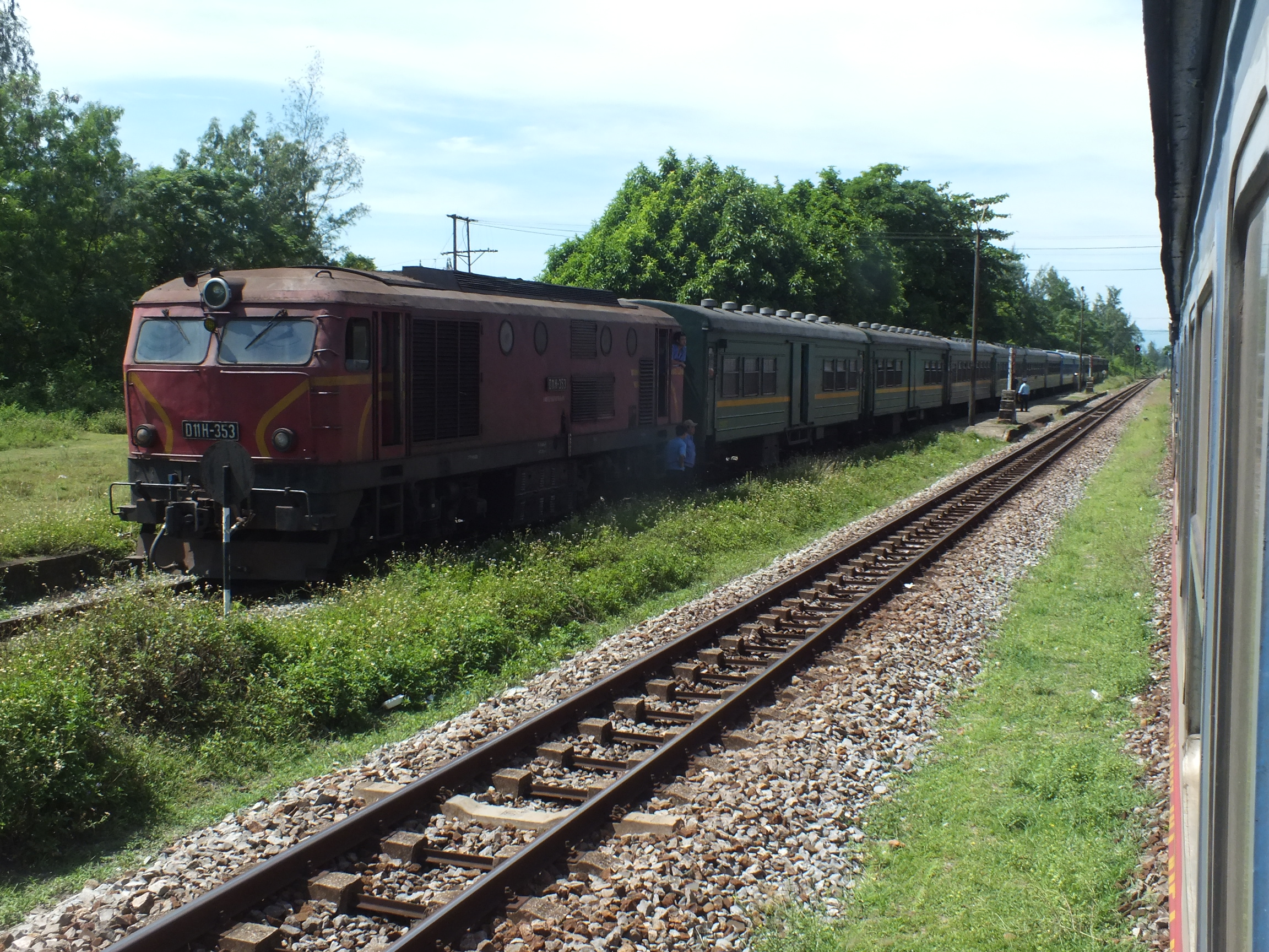 2013-07-16 North–South Railway (Vietnam)